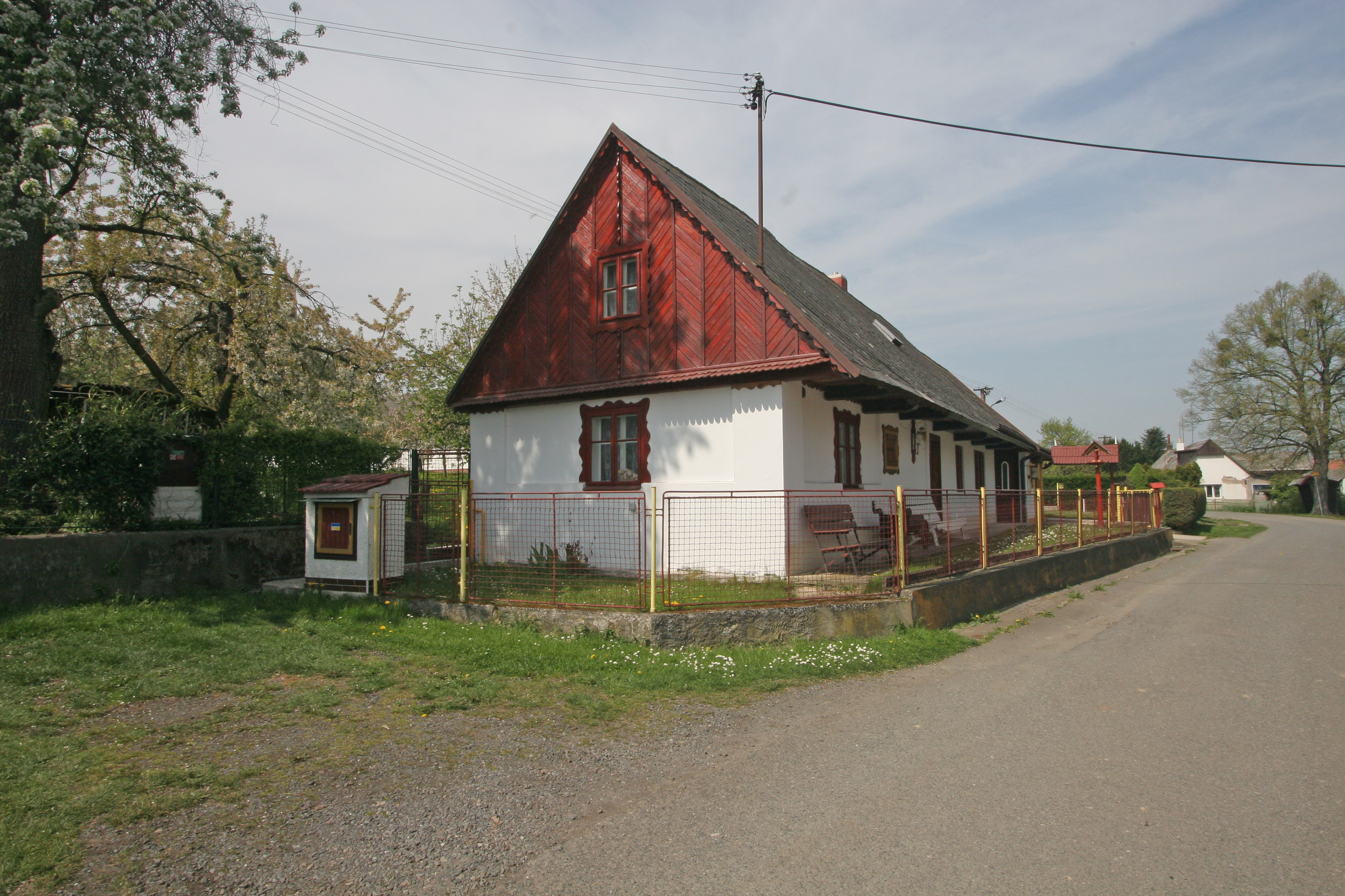 Radlín čp 10